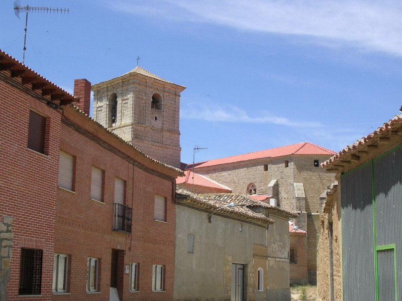 Fotografía de es::es:Usuario:Rapomon cedida a la Wikipedia bajo la siguiente licencia: Categoría:España (imagen)